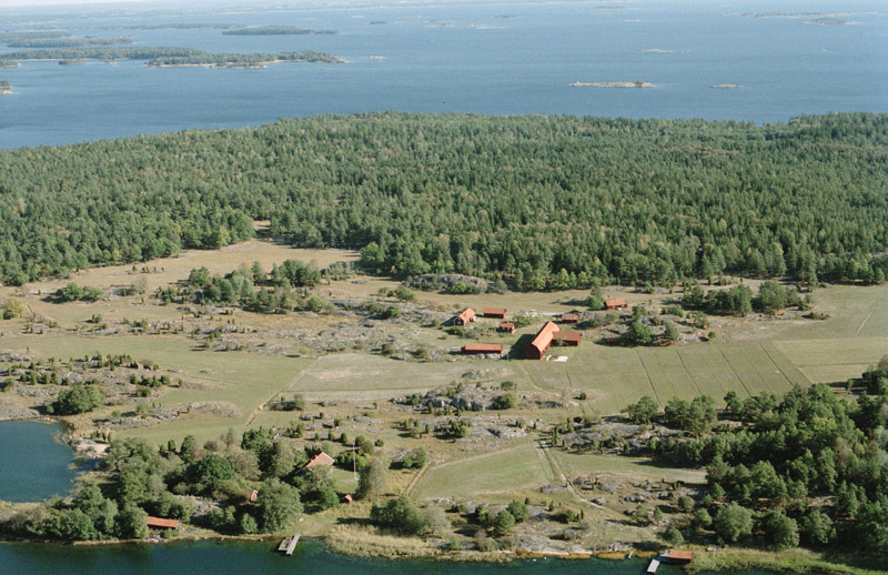 Bilden är tagen mot (väderstreck): ONO Motiv: Långö Nyckelord: Flygbilder, Naturreservat, Riksintressen Kategori: Kust- och skärgårdsmiljö Bilden är tagen mot (väderstreck): ONO.